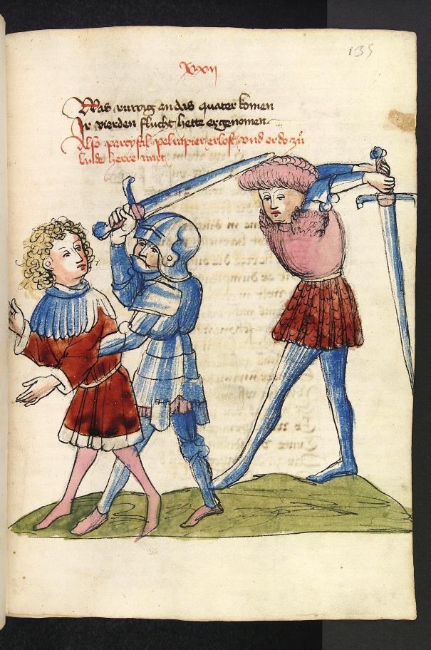 Parzival und Condviramur. Handschrift aus der Werkstatt von Diebold Lauber, Hagenau (15. Jahrhundert), Heidelberg, Cod. Pal. germ. 339, 135r